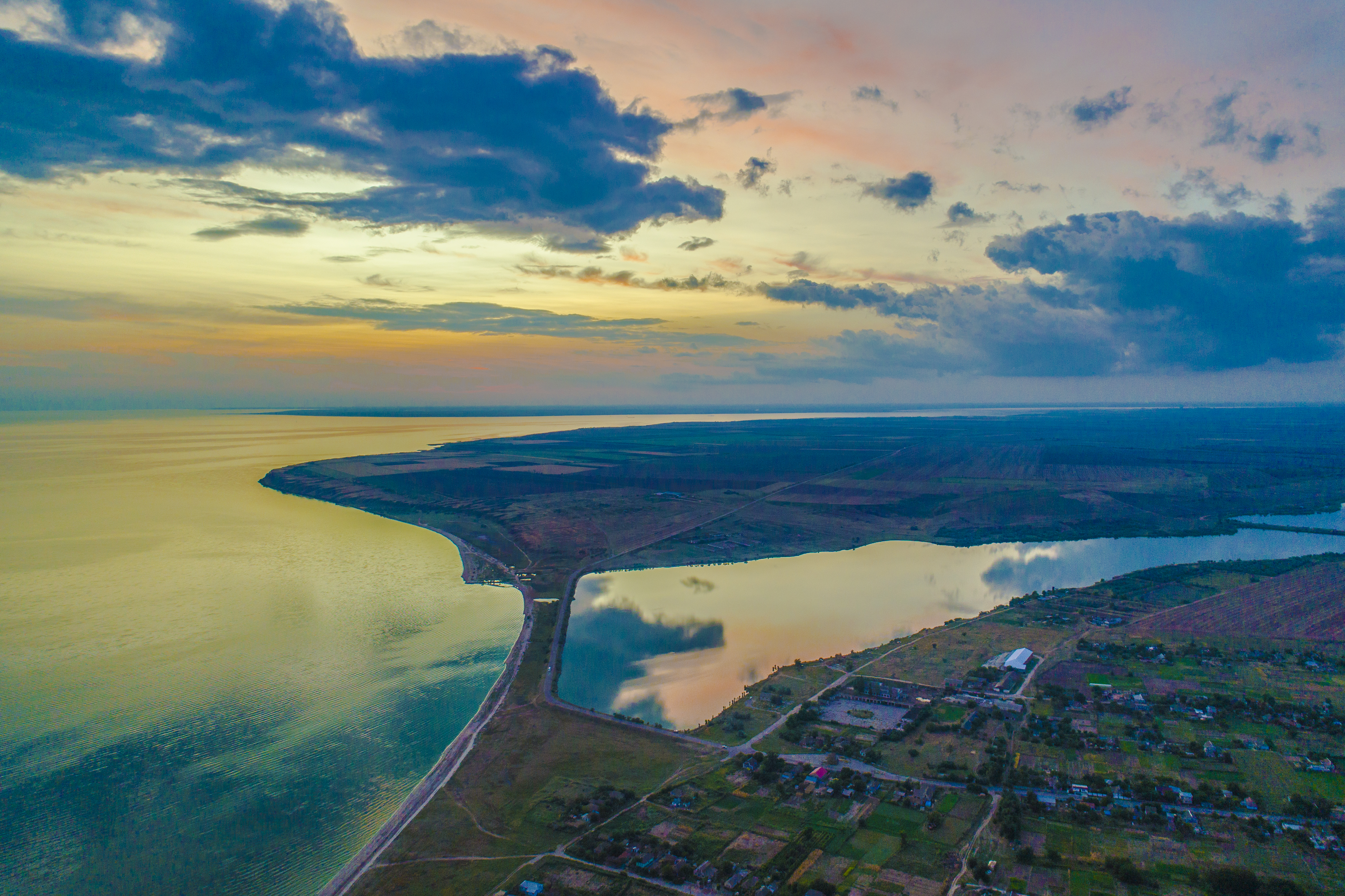 Олександрівський заказник, Білозерський район, с. Олександрівка